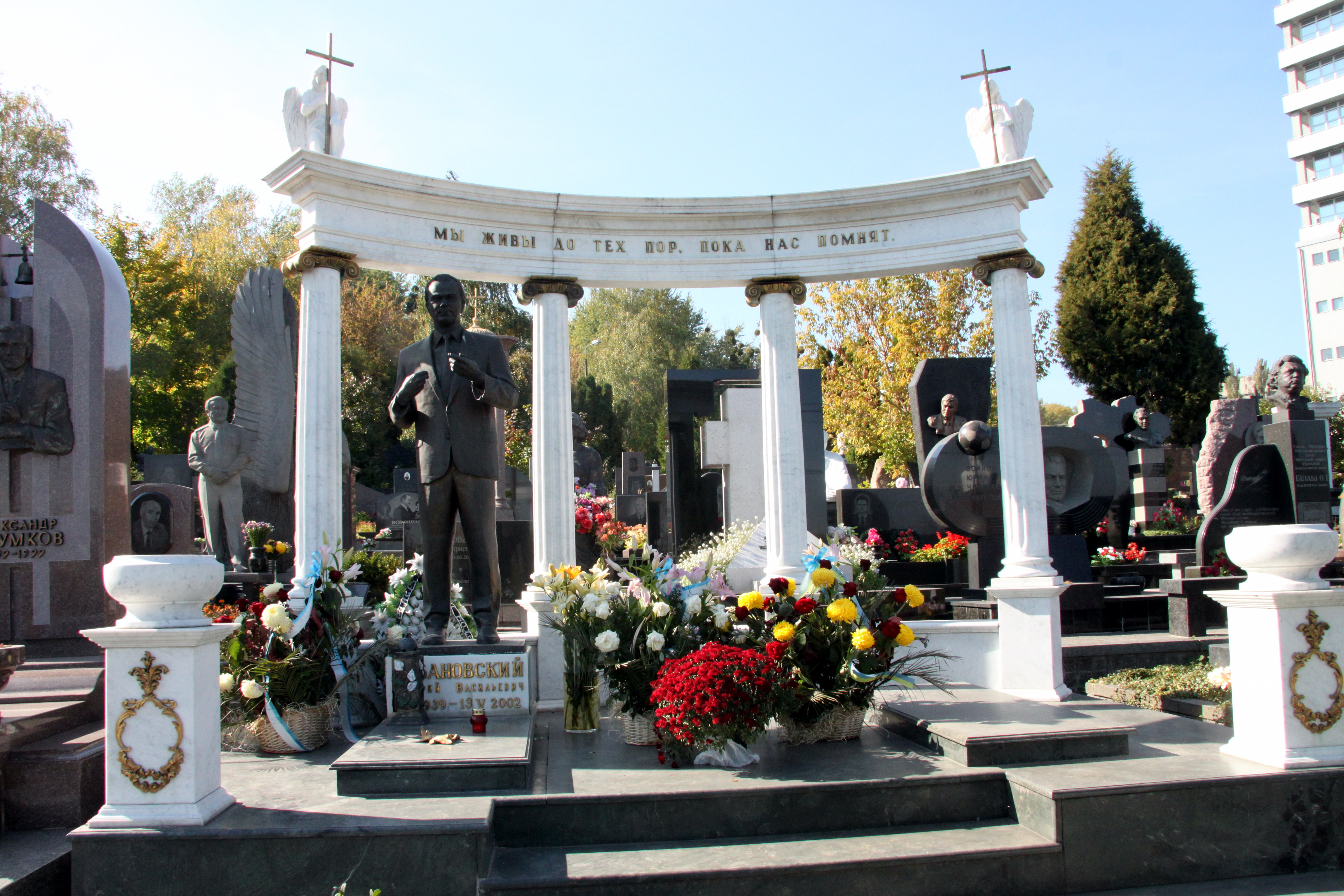 Могила Лобановського В. В. головного тренера збірної України з футболу, Байкова вул., 6, Київ